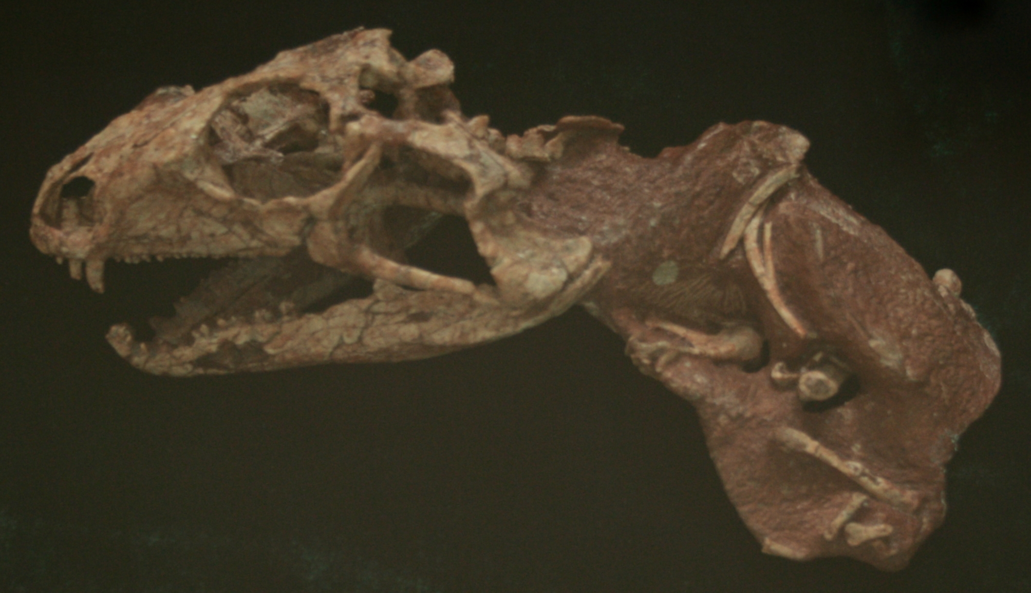 Tianyusaurus zhengi Lü et al. (2008)